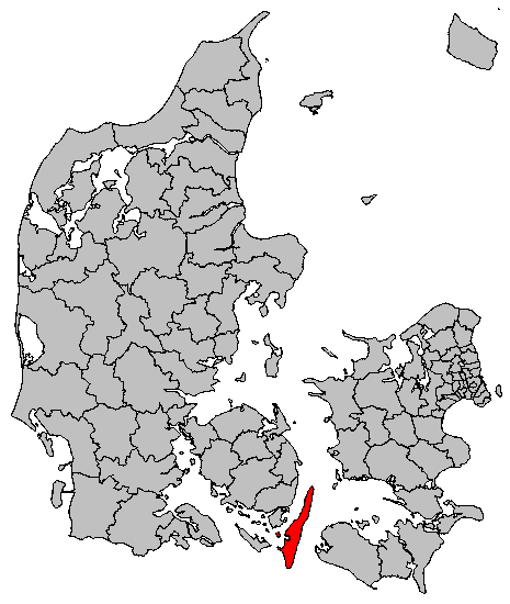 Lokalisering af Langeland Kommune.